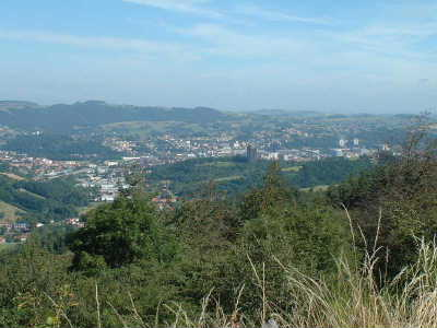 vue de Firminy depuis St Just Malmont prise en juillet 2001 photo personnelle